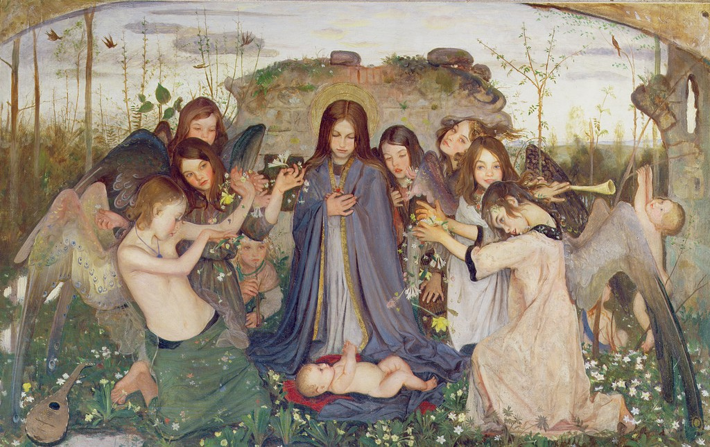 Mark Lancelot Symons (United Kingdom, 1887 - 1935). Madonna and Child with Angels, 1925. Uknown owner.